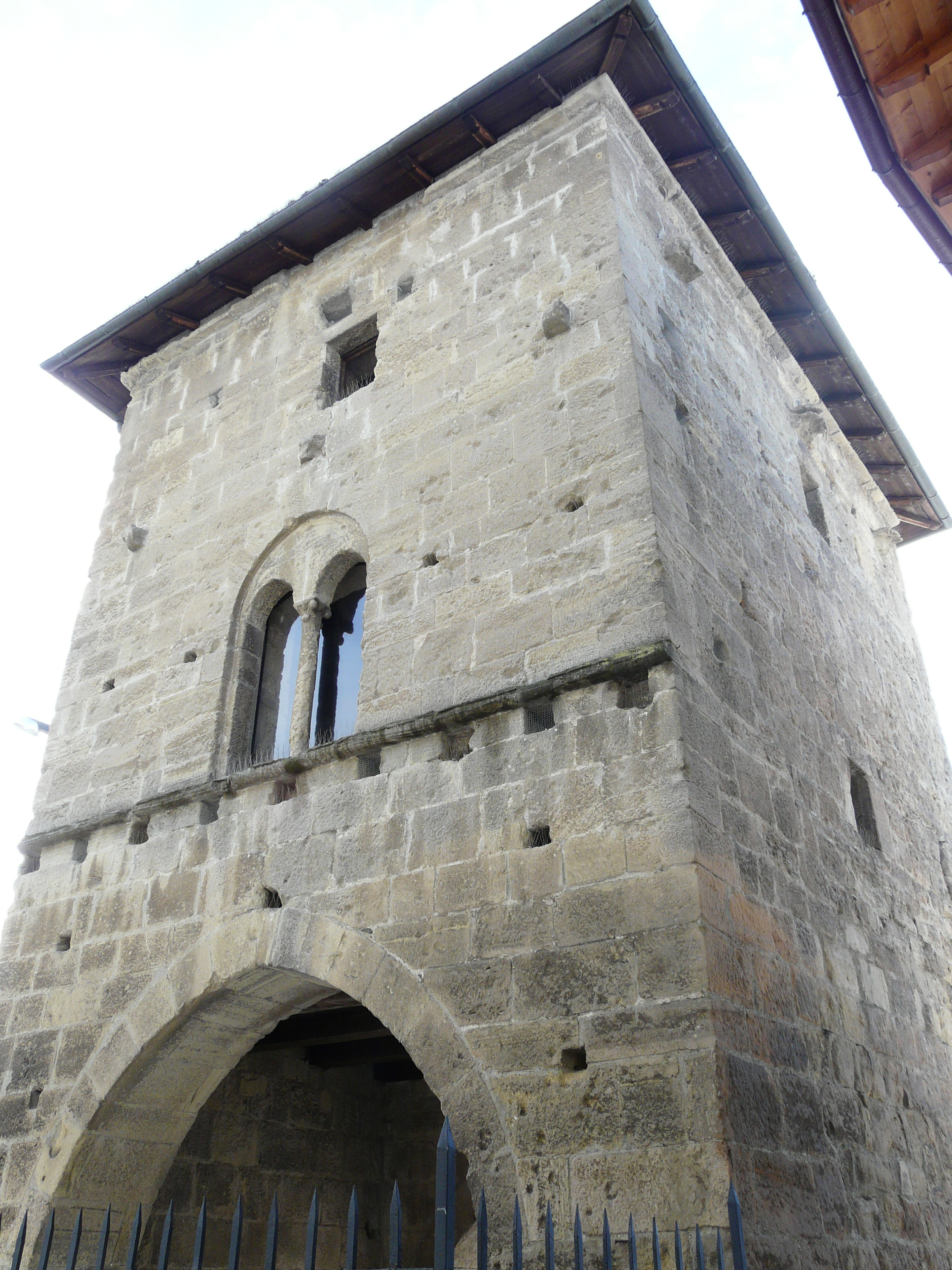 Il Portino, Gavi, Piemonte, Italia